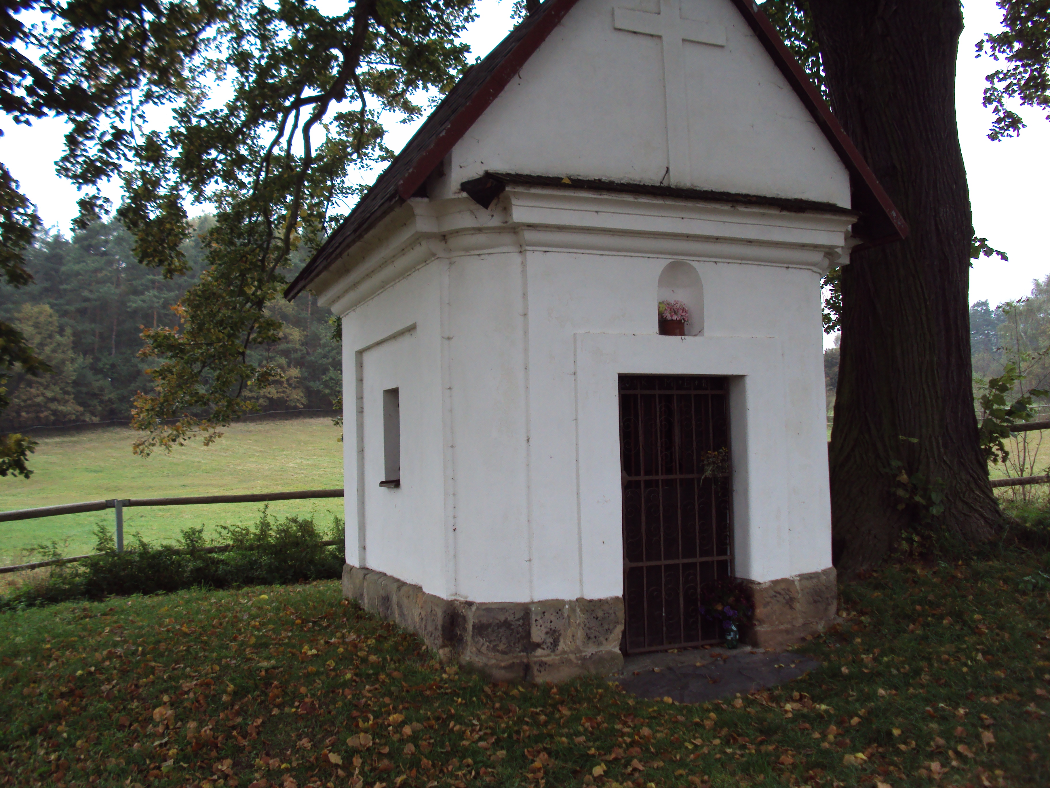 Kaplička v obci Vranov u Mimoně